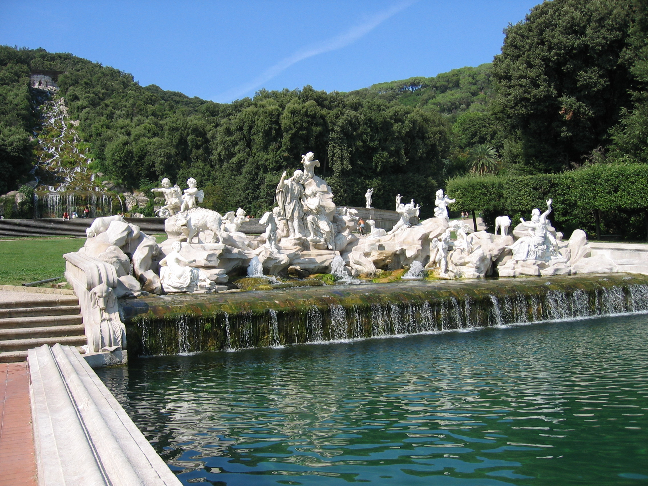 Figurengruppe eines Brunnens im Park des Königspalasts von Caserta